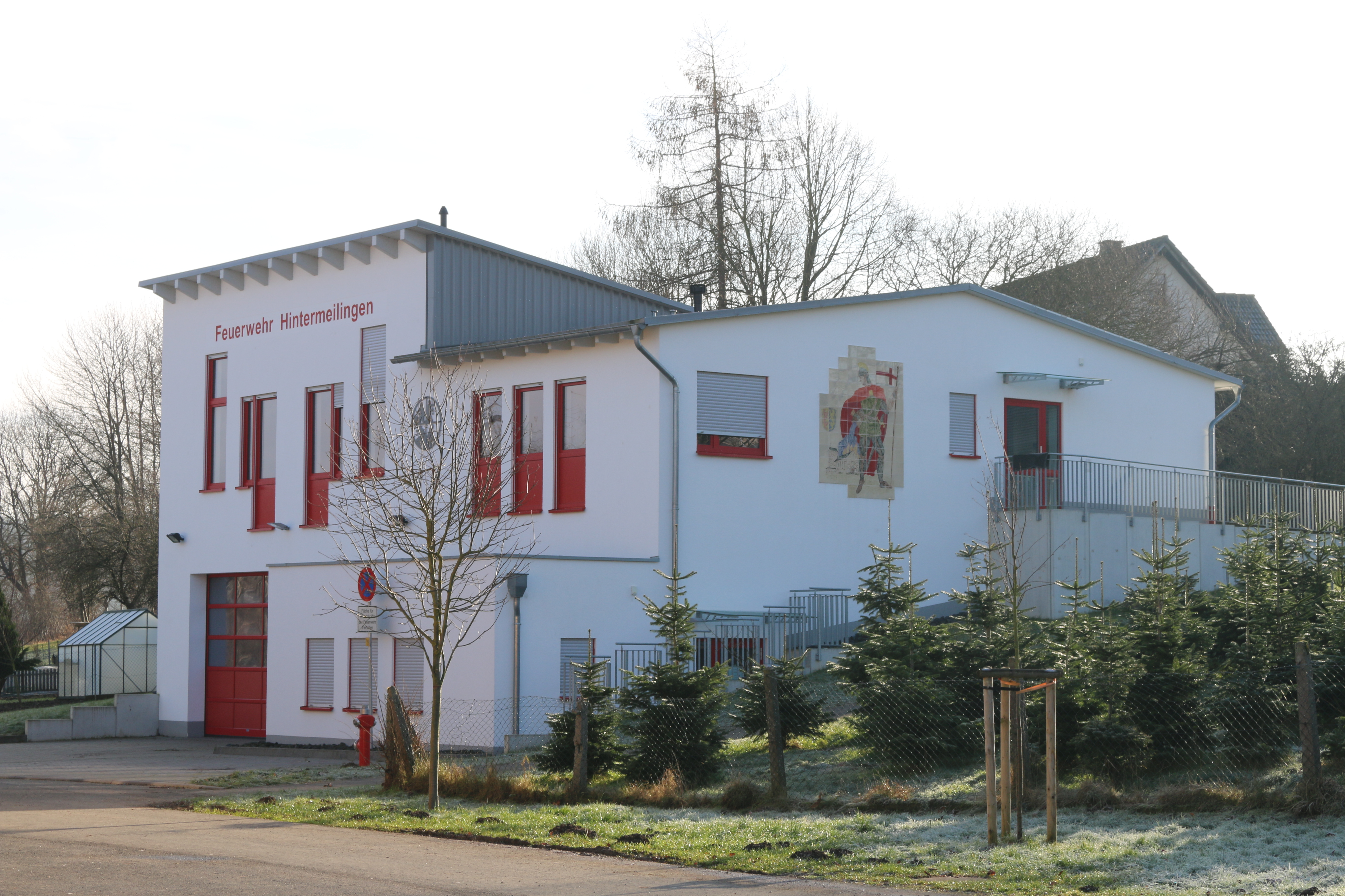 Hintermeilingen: Das Gebäude der freiwilligen Feuerwehr